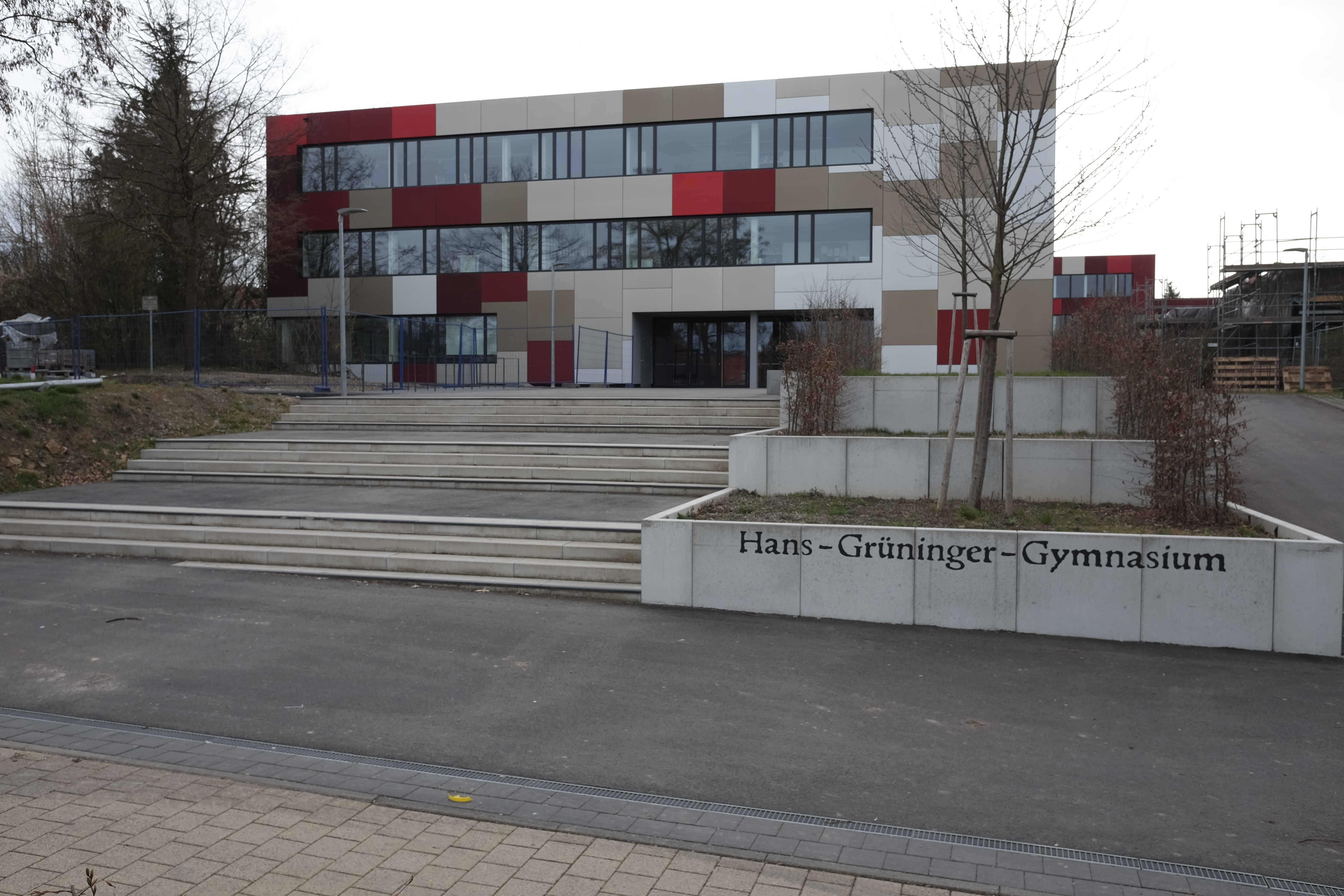 Neu gestaltete Fassade und westlicher Eingangsbereich des Hans-Grüninger-Gymnasiums in Markgröningen.